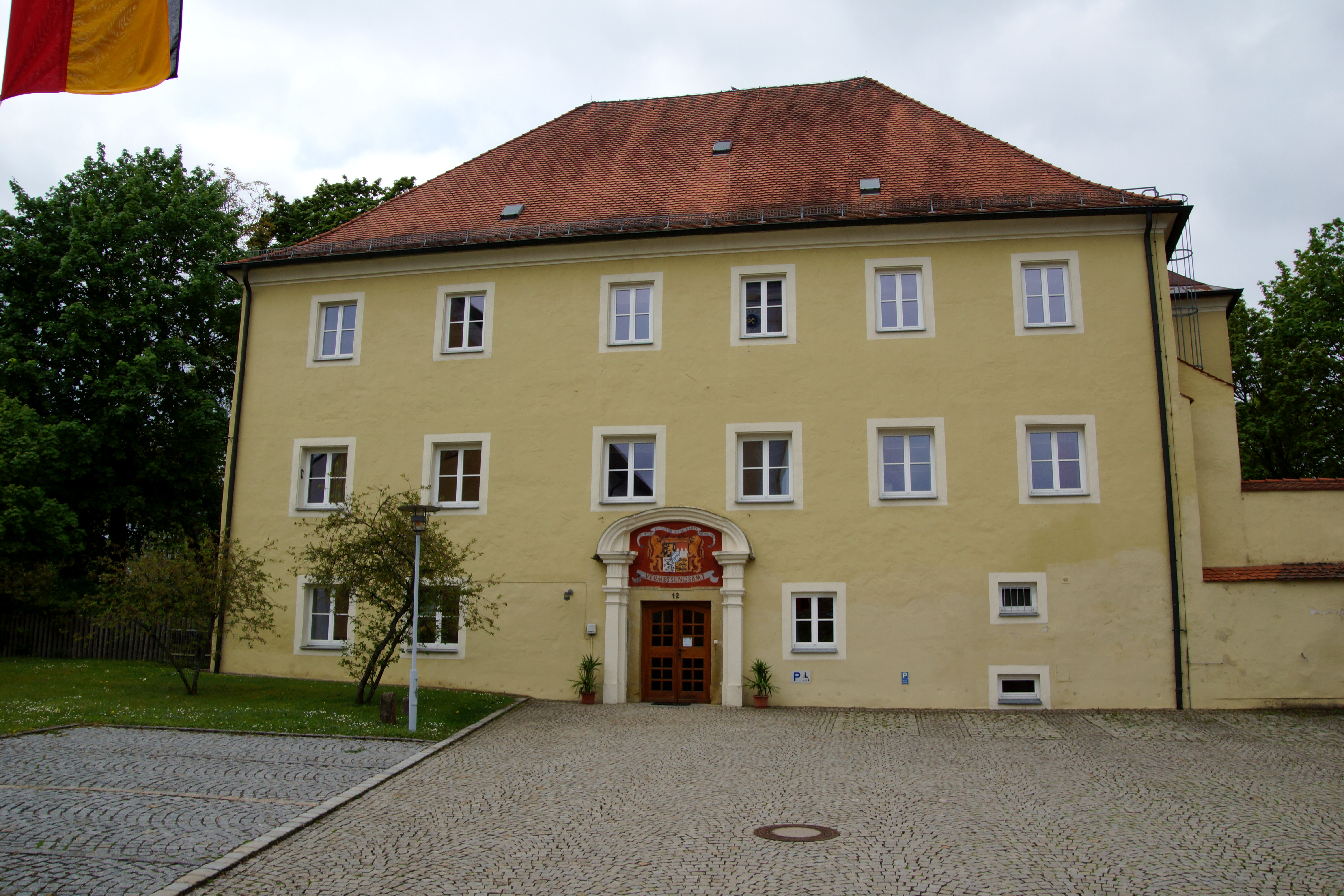 Stadt Hemau in der Oberpfalz